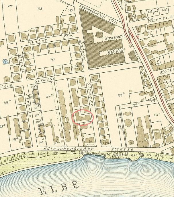 Lage der Firmengebäude von „Cruse & Co“ auf der Lützow Strasse (heute Franz-Lehmann-Straße). Basis: Stadtplan von Dresden 1911